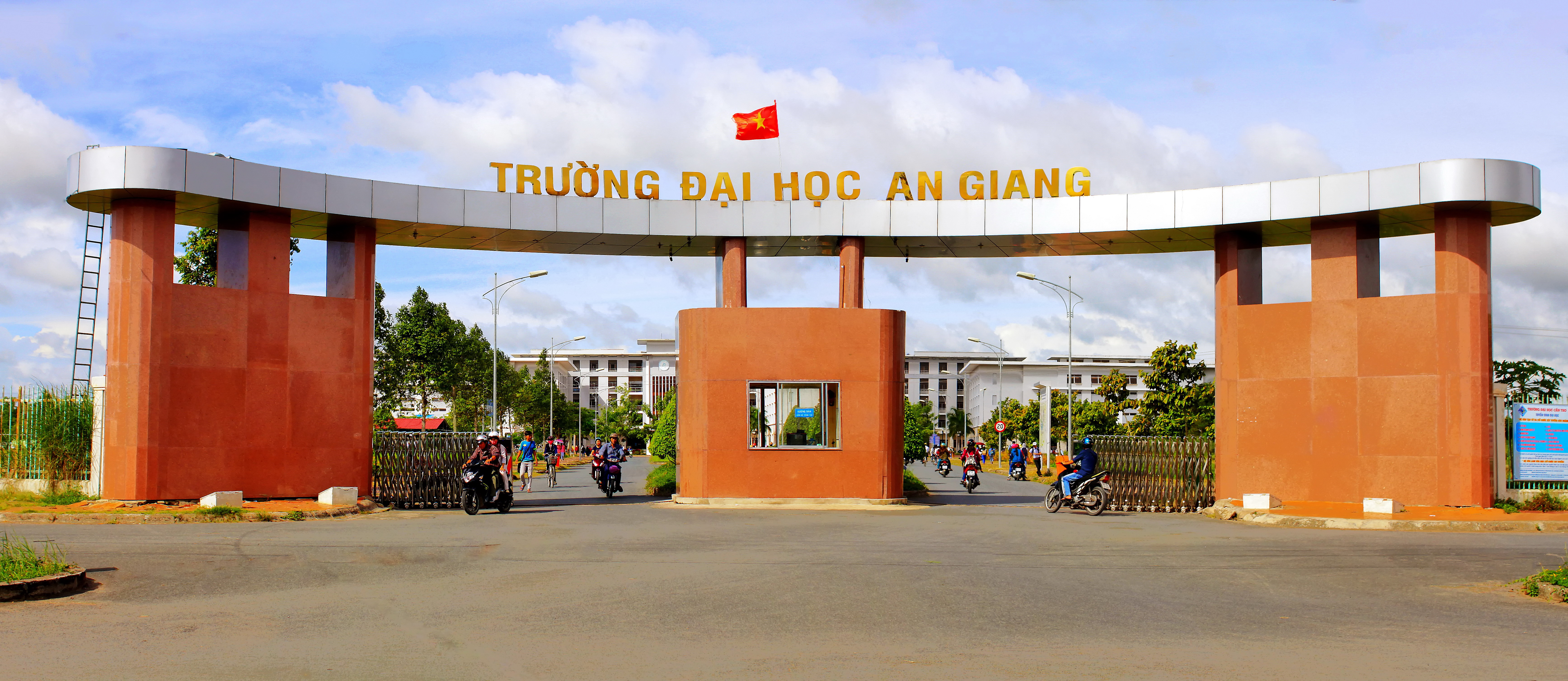 Đại học An Giang (khu mới) ở TP Long Xuyên, An Giang, Việt Nam.